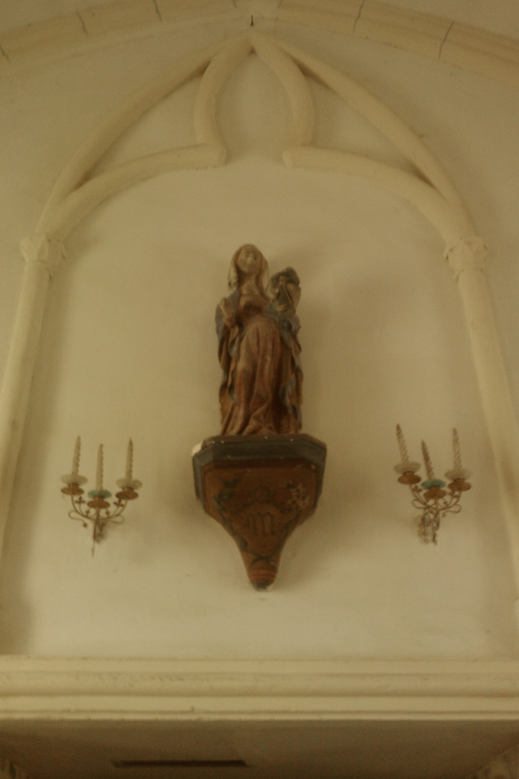 Cimetière et église Saint-Corneille de Nicorps : statue en pierre polychrome du 15e.